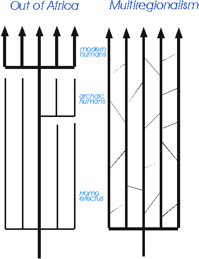 Perbandingan out of africa dengan teori multiregional